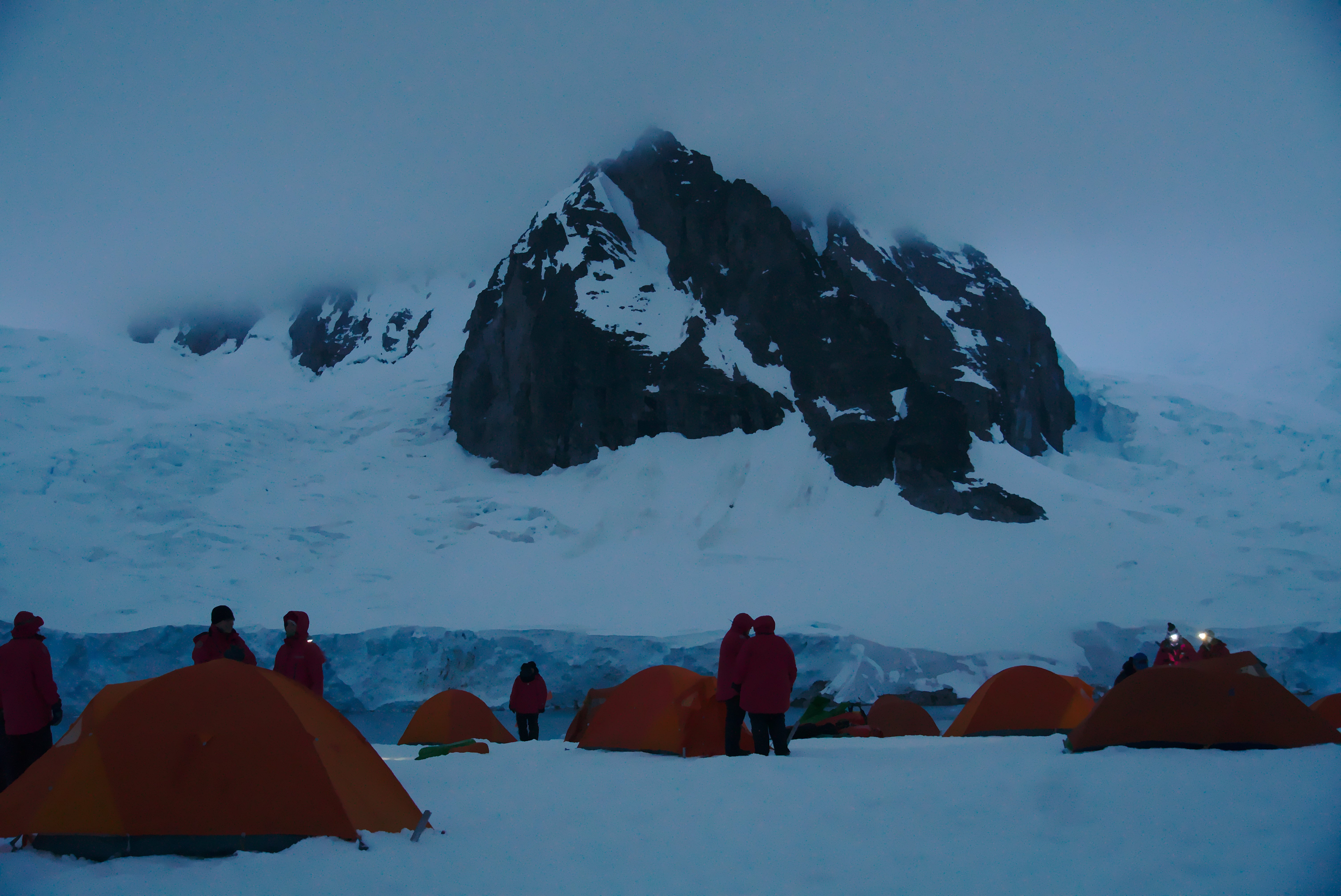 Camping at Hanka Island